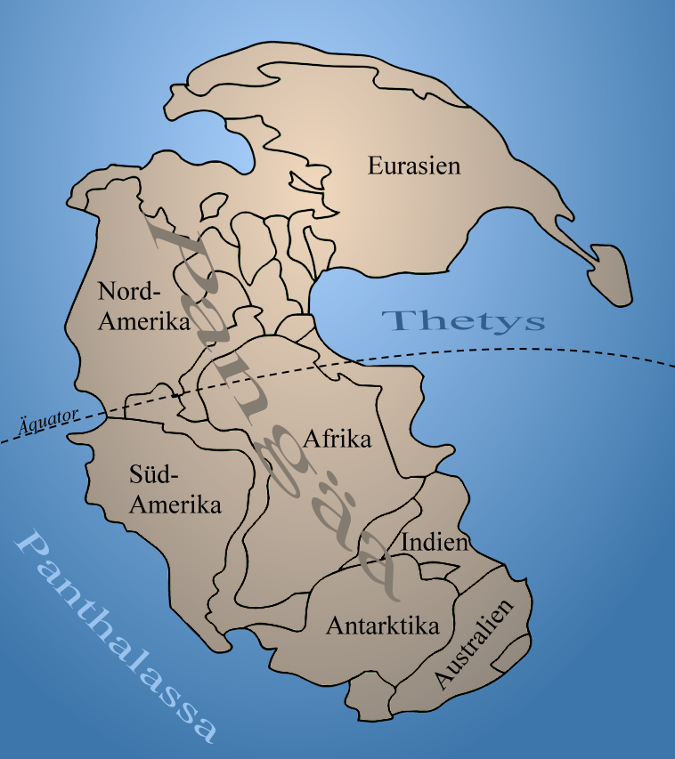 Der Superkontinent Pangäa und der "Urozean" Panthalassa in erdgeschichtlicher Vergangenheit.